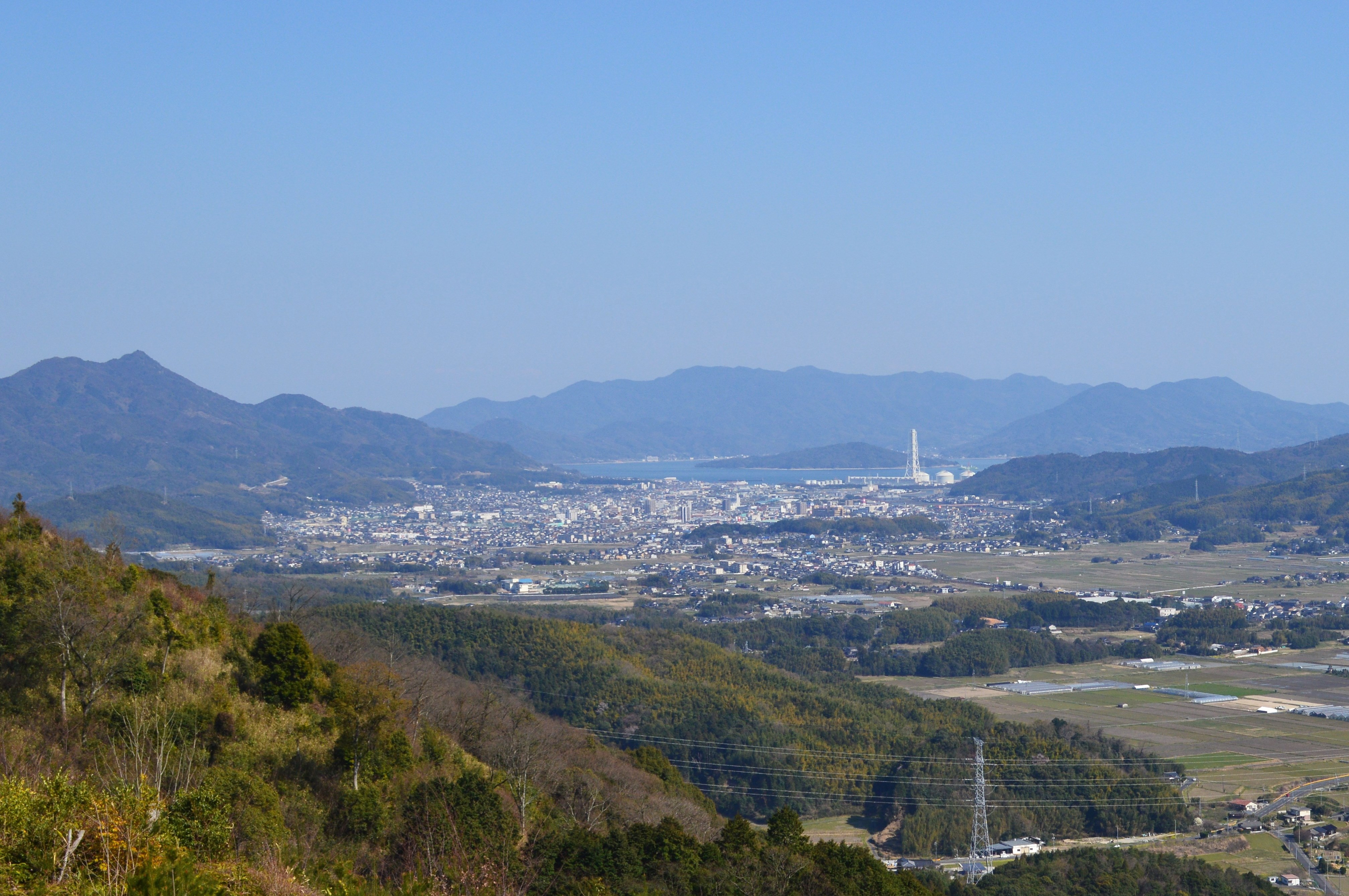 石城山から望む平生町市街地